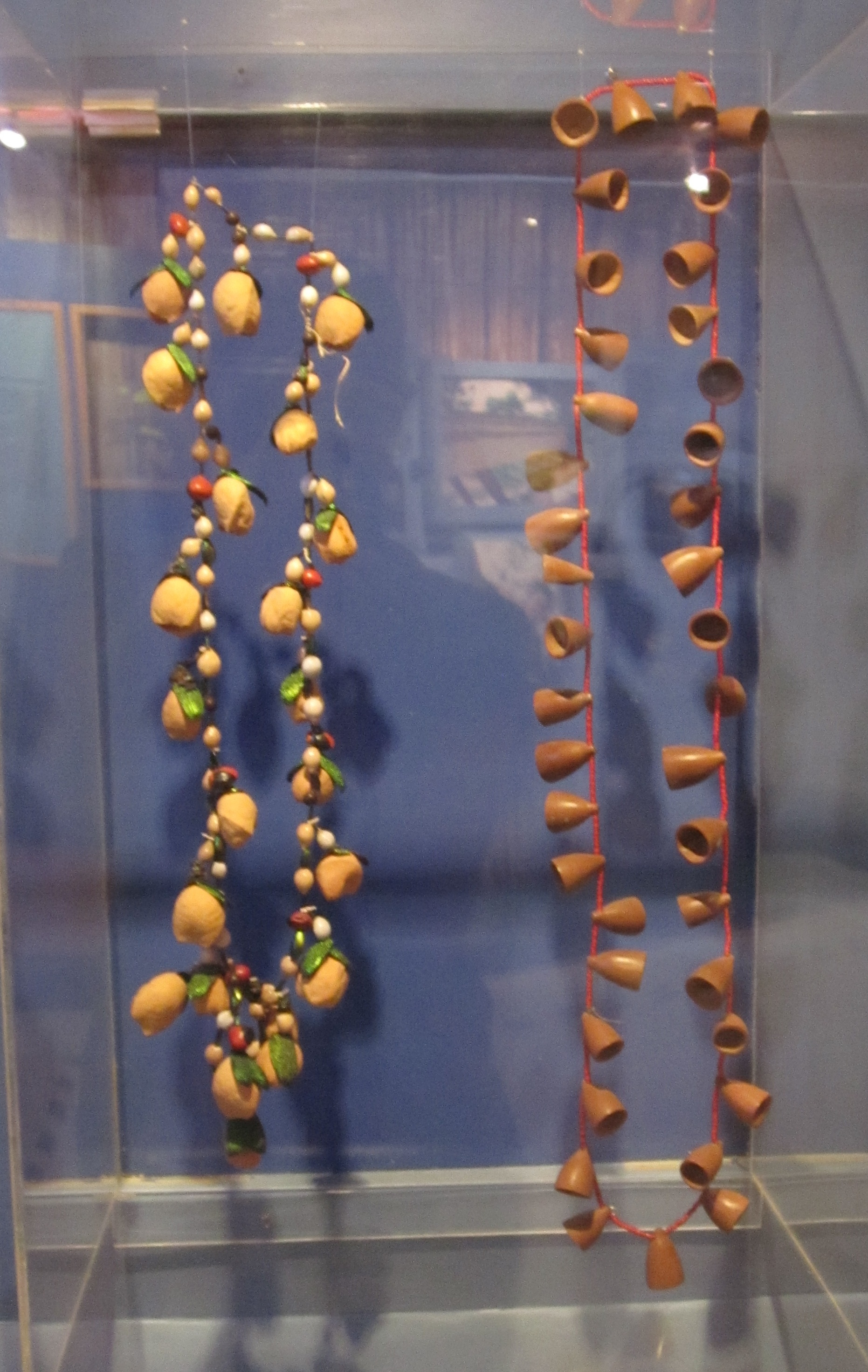 Cofan jewelry